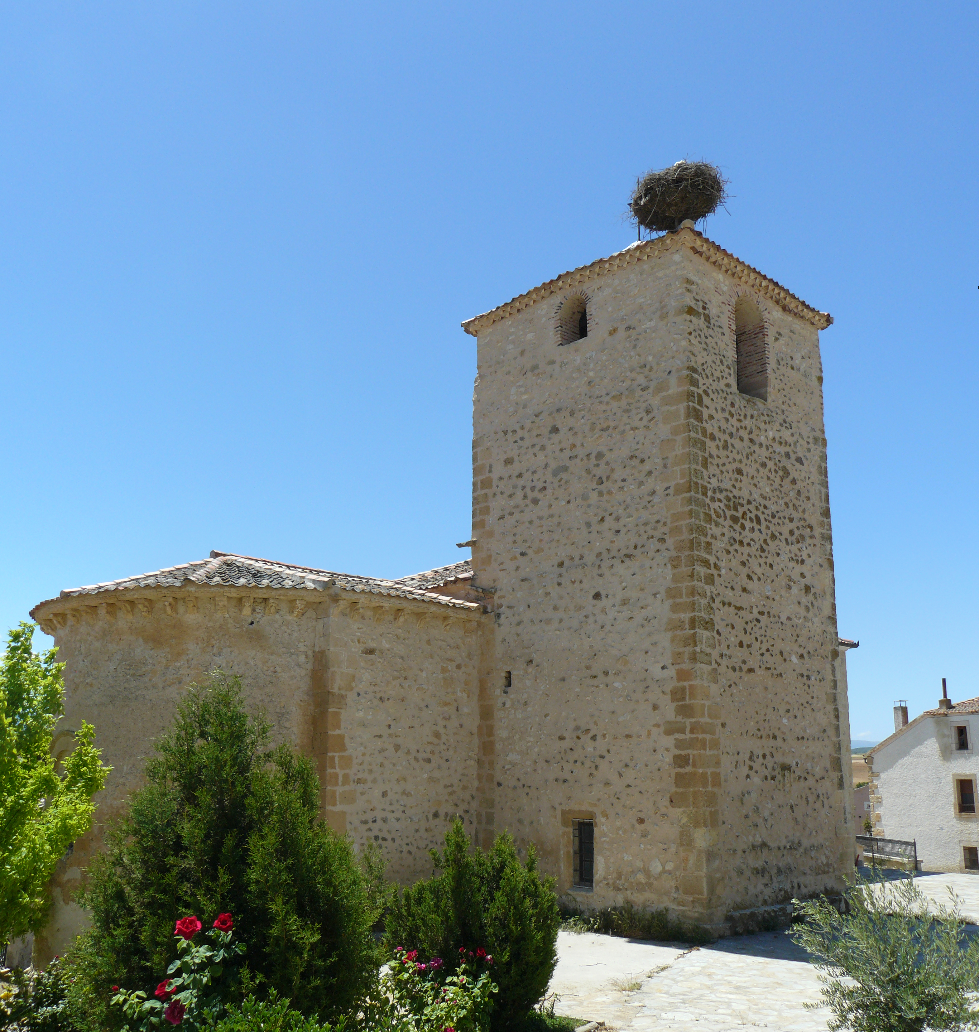 Iglesia románica de Santa Marta del Cerro, Segovia.